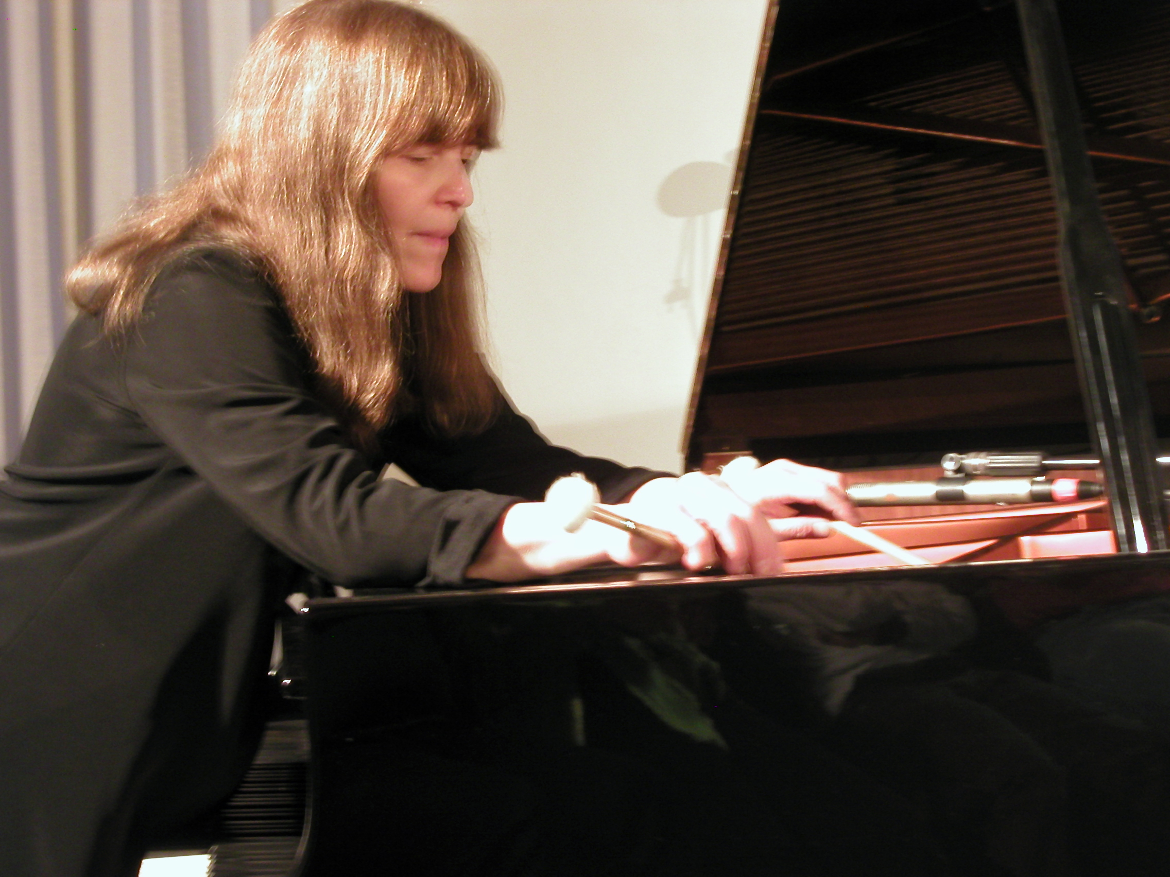 Marilyn Crispell mit dem Quartet Noir im Schloß Weikersheim